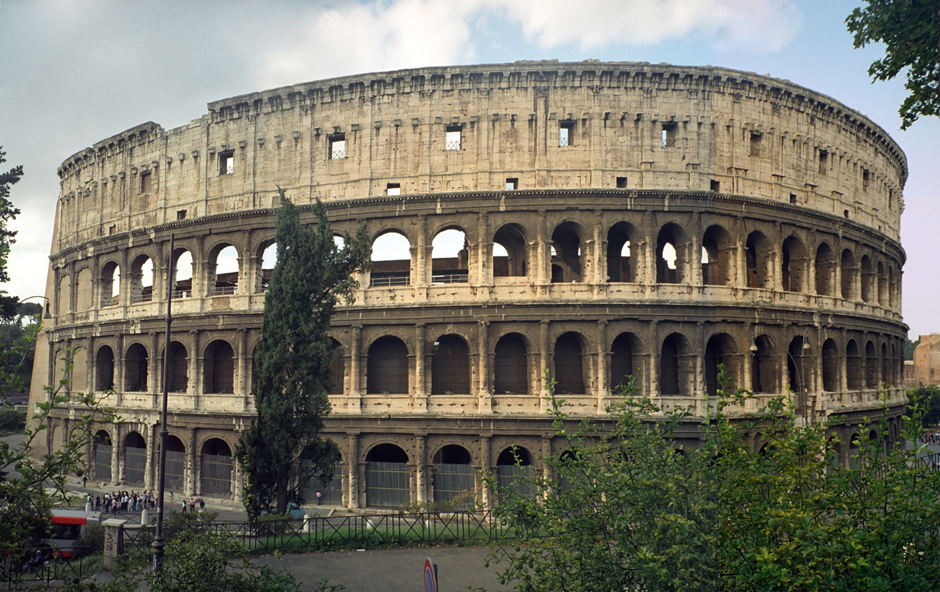 Roma, Colosseo.